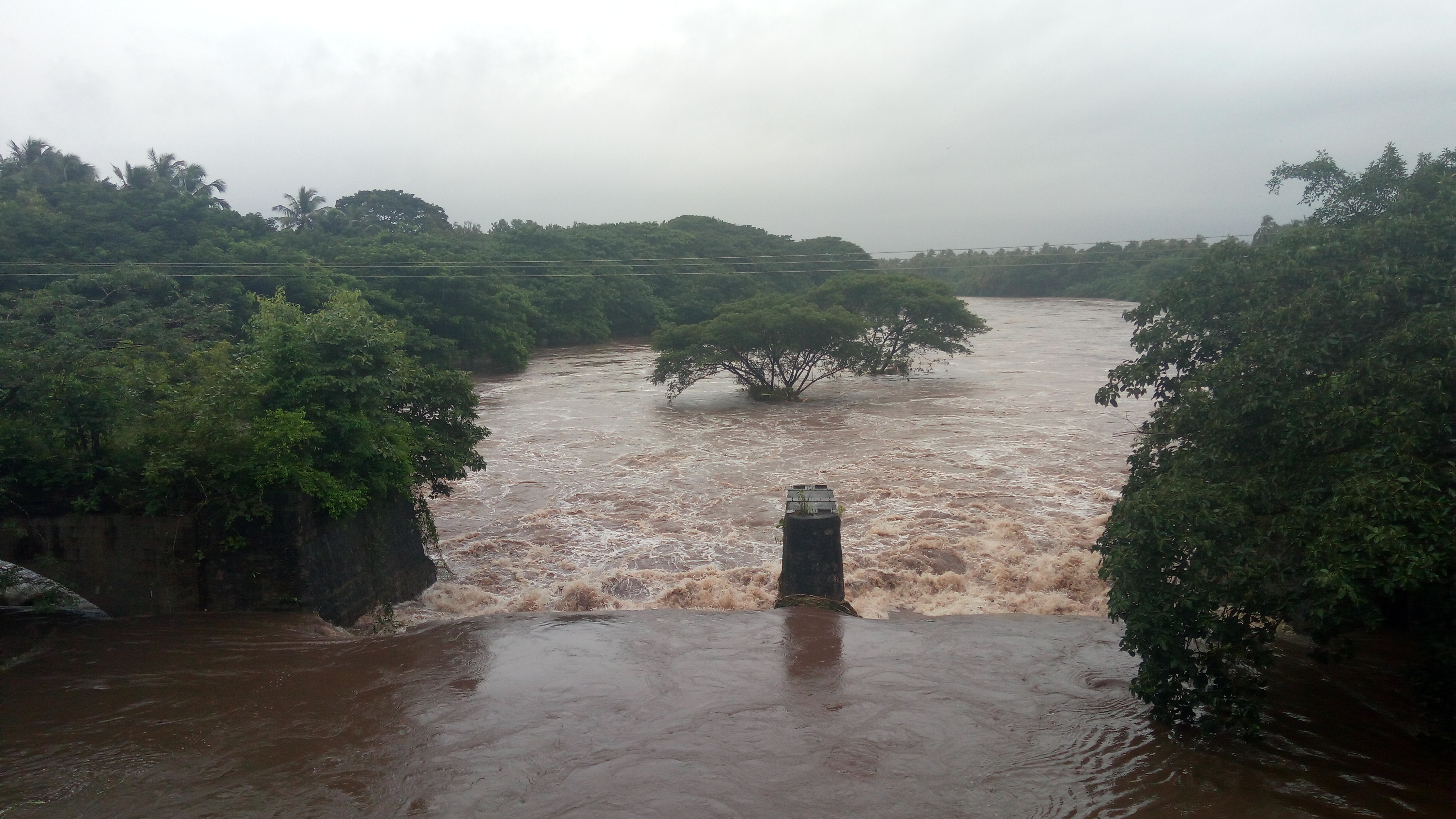 During Rainy time